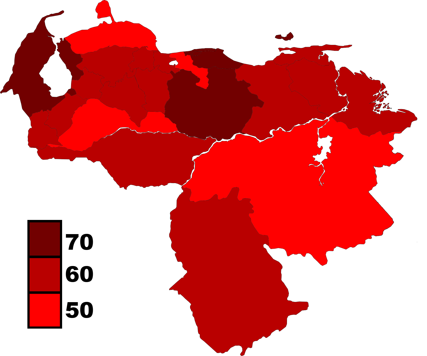 Porcentaje de Nicolás Maduro por estado.